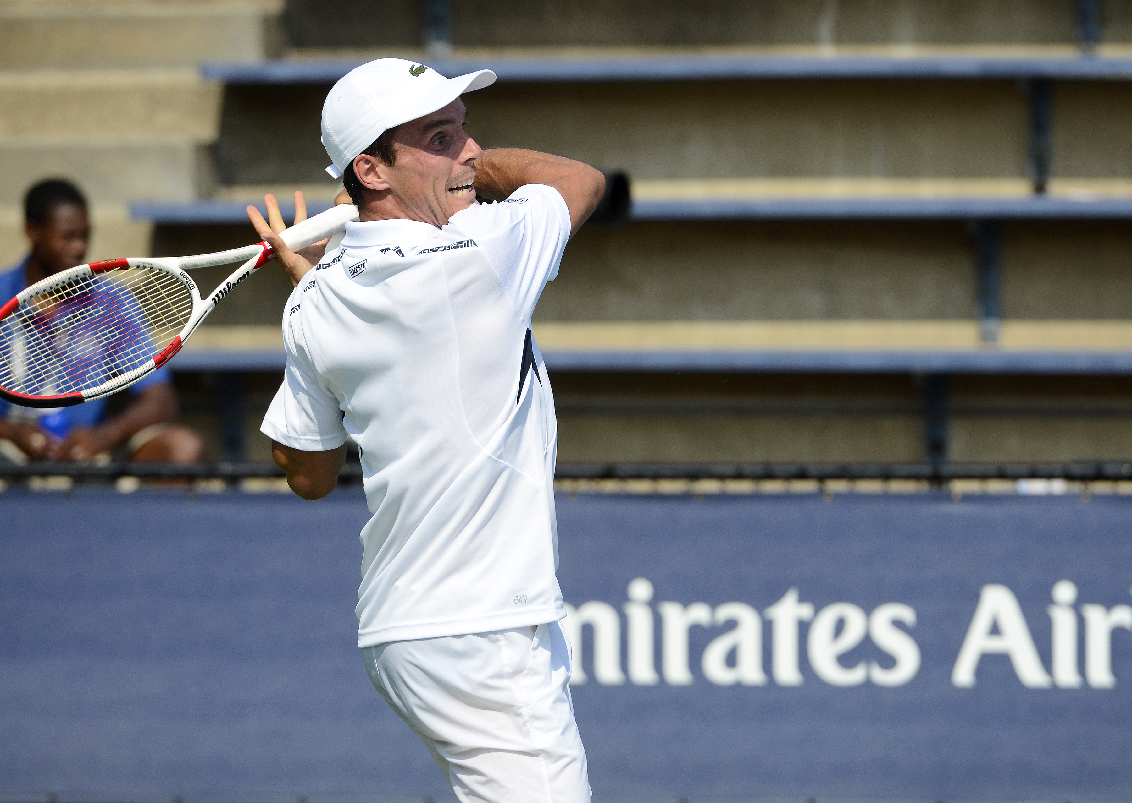 August 26, 2014 Queens, NY Roberto Bautista Agut (ESP) def. Andreas Haider-Maurer (AUT)